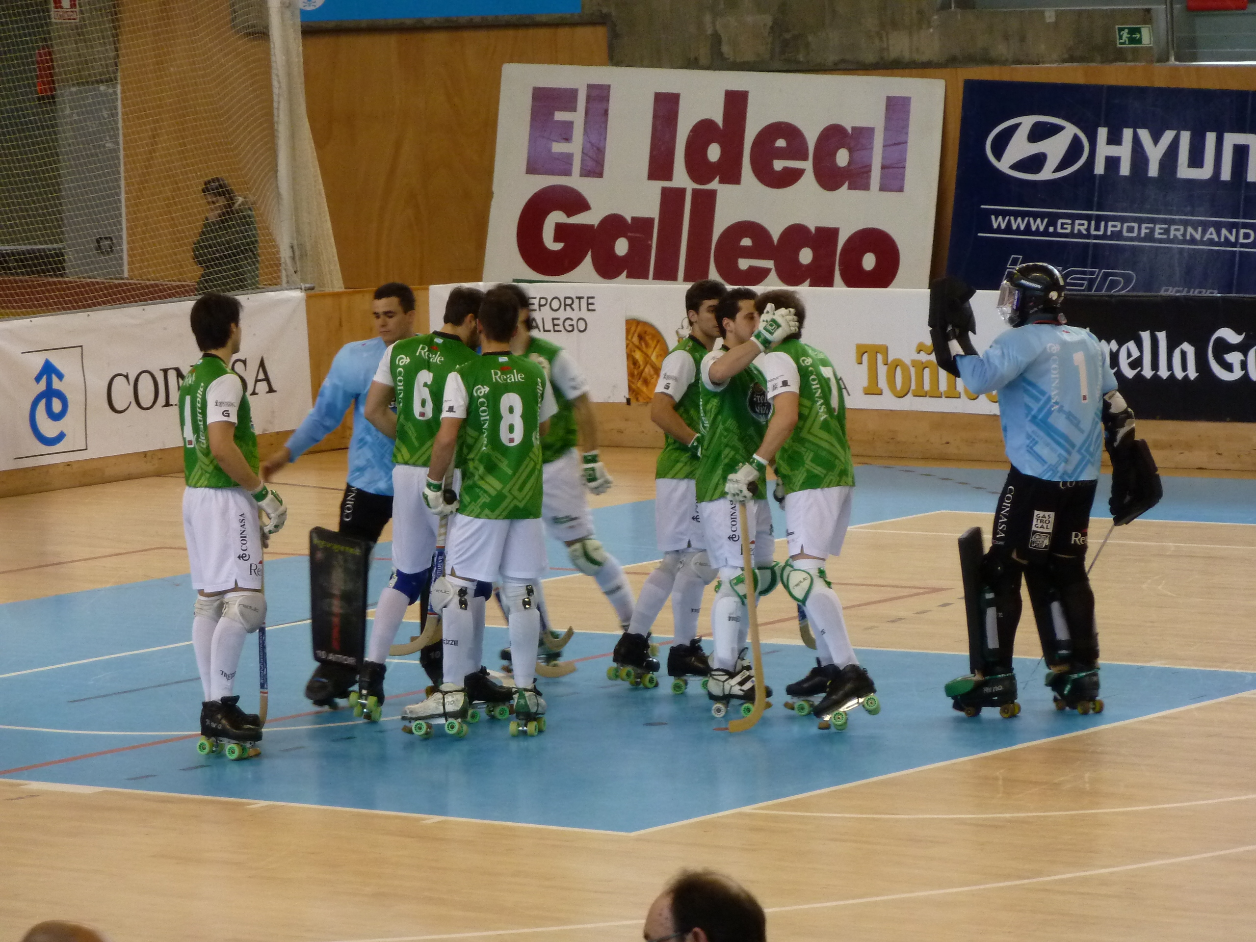 Xuntanza do HC Liceo no comezo do partido de hóckey entre o HC Liceo e o CP Vic en partido da OK liga no Pazo dos deportes de Riazor na Coruña.